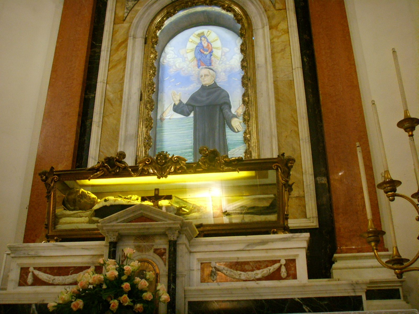 Viareggio, chiesa di sant'andrea, altare con le reliquie di sant'antoni maria pucci